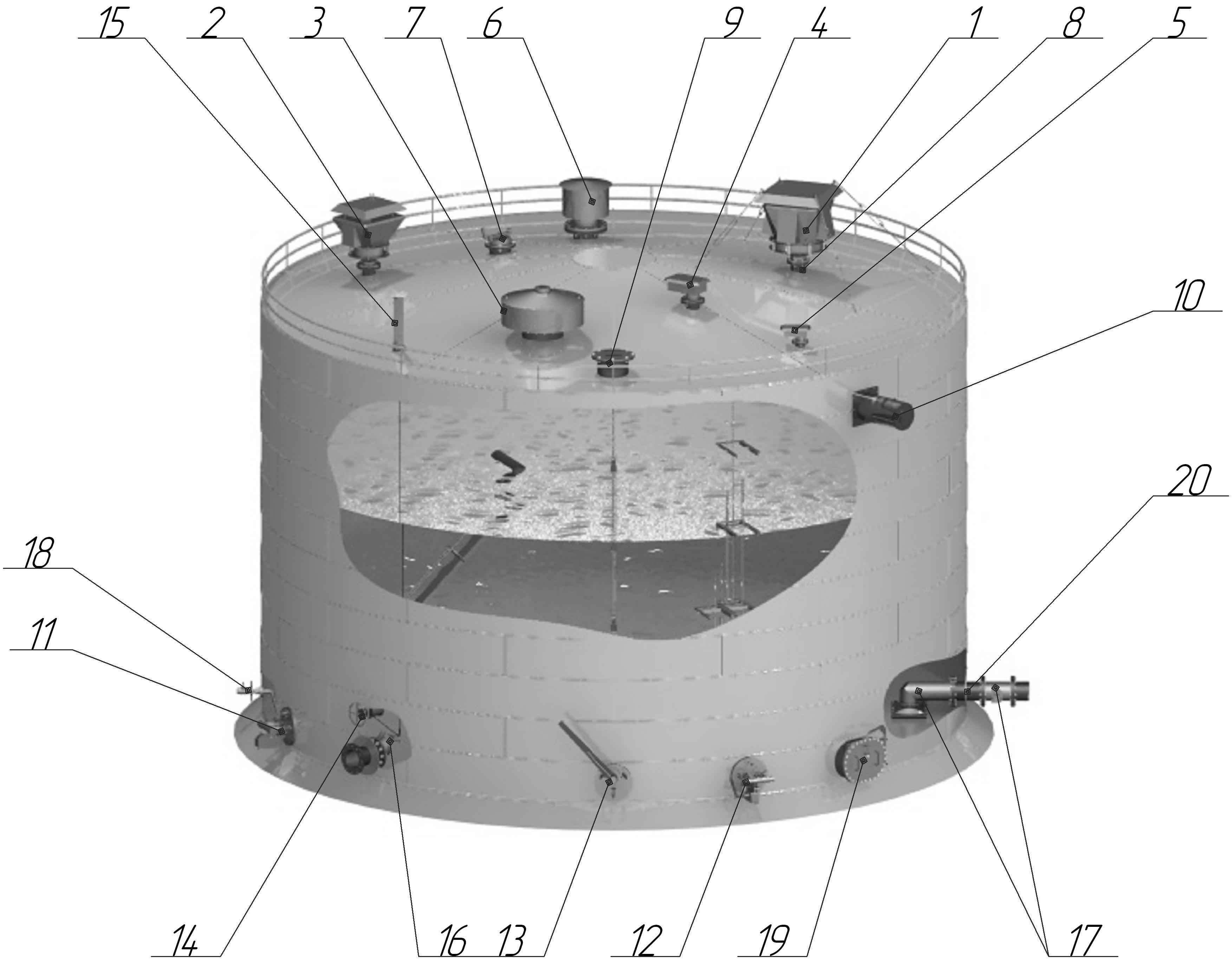 1 — клапан дыхательный совмещенный КДС-3-1500, 2 — клапан дыхательный механический КДМ, 3 — клапан аварийный АК, 4 — совмещенный механический дыхательный клапан СМДК, 5 — клапан дыхательный механический КДМ-50, 6 — патрубок вентилляционный ПВ, 7 — люк замерный ЛЗ, 8 — люк монтажный ЛМ, 9 — люк световой ЛС, 10 — генератор пены средней кратности ГПСС, 11 — пробоотборник плавающий резервуарный ПП, 12 — пробоотборник стационарный резервуарный органного типа ПСР ОТ, 13 — пробоотборник стационарный секционный резервуарный ПСР, 14 — механизм управления хлопушкой боковой МУ-1, 15 — механизм управления хлопушкой верхний МУВ, 16 — хлопушка ХП, 17 — приемораздаточное устройство ПРУ, 18 — кран сифонный КС, 19 — люк-лаз ЛЛ, 20 — приемораздаточный патрубок ПРП